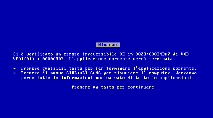 BSOD di Windows 95 OSR2.5 mostrata dopo aver immesso il comando "con/con/con" nella finestra Esegui. Screenshot preso da una macchina virtuale.